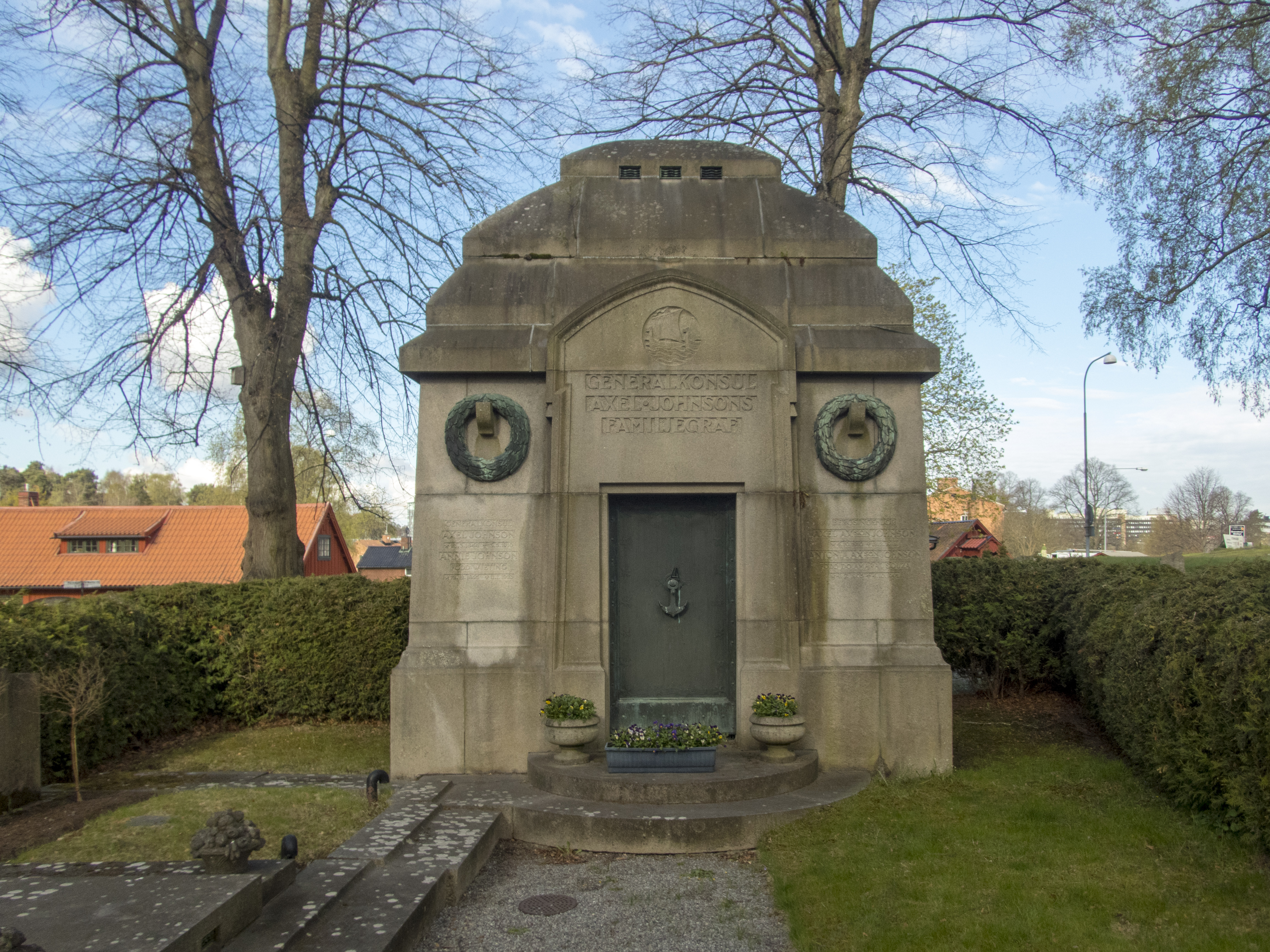 Axel Johnsons gravkor, Solna kyrkogård. Byggt 1909. Arkitekt Isak Gustaf Claeson